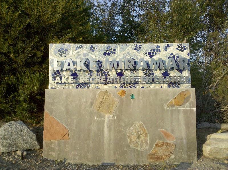 Entrance sign